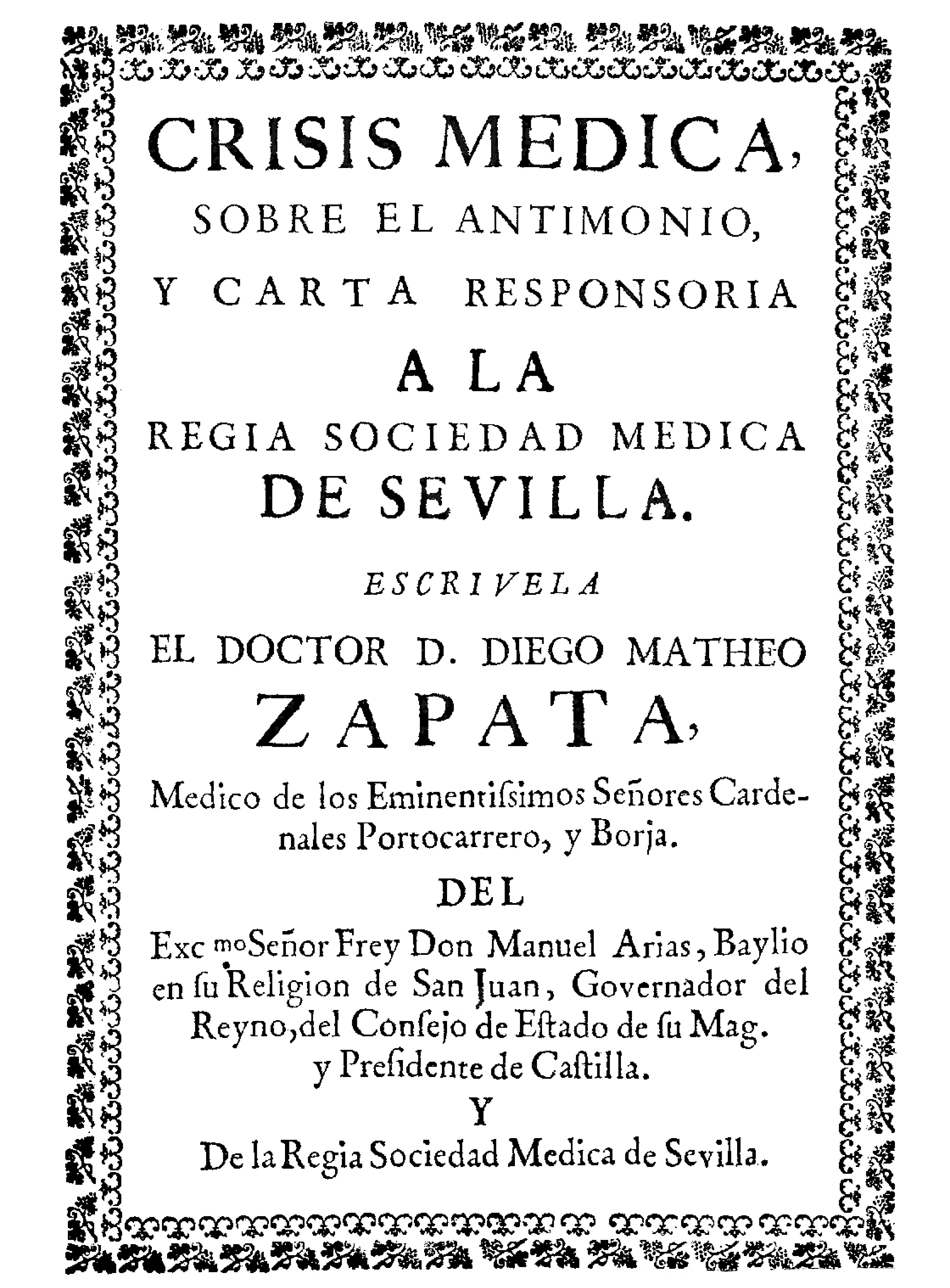 Portada del libro titulado "Crisis medica sobre el antimonio", publicado en 1701 por Diego Mateo Zapata